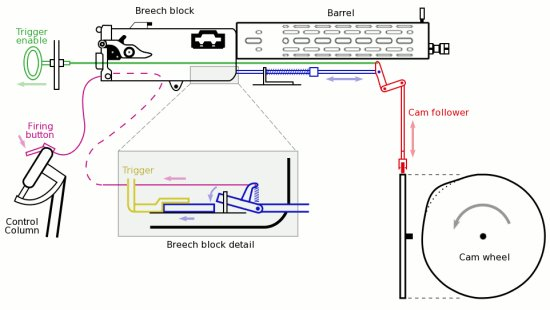 Sistema de disparo Fokker